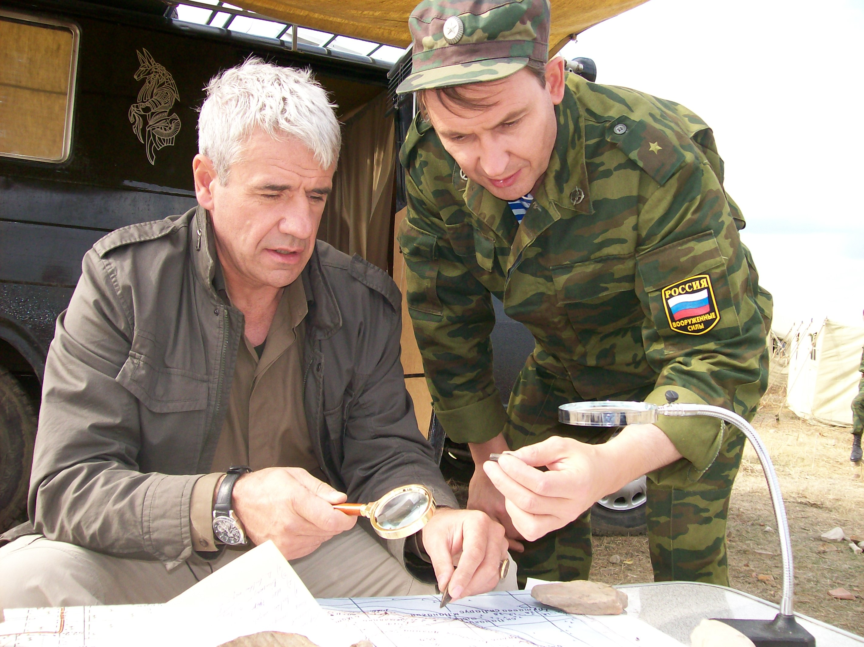 к/ф "Золото Скифов"- 2008